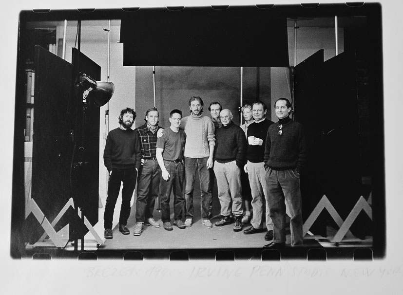 Photograph from Jiří Poláček´s archive.